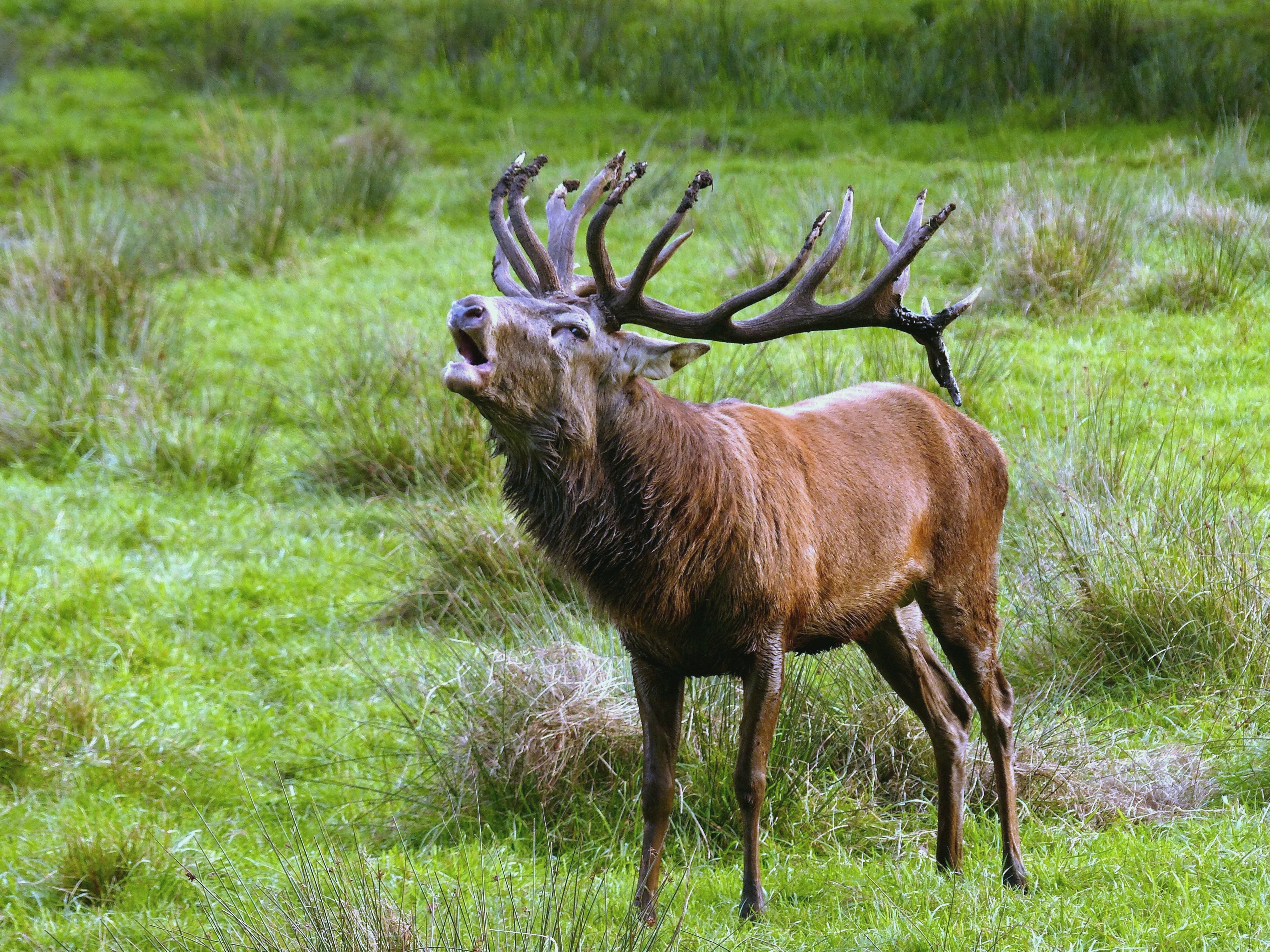 Platzhirsch im Wildpark Eekholt, während der Brunft.